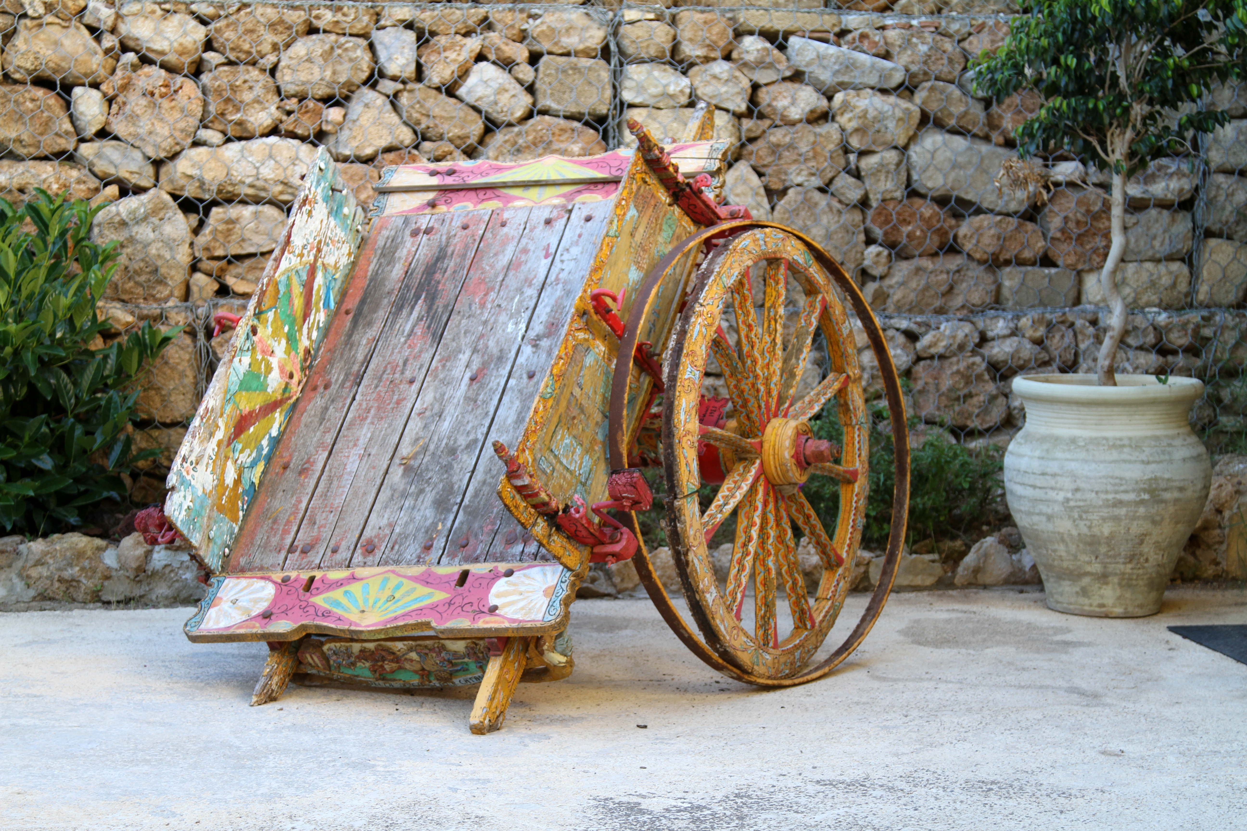 Monreale: carretto siciliano in attesa di restauro.